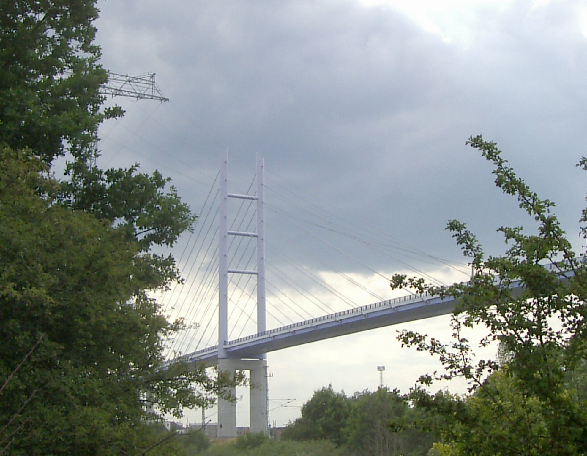 Rügenbrücke, von Dänholm aus gesehen